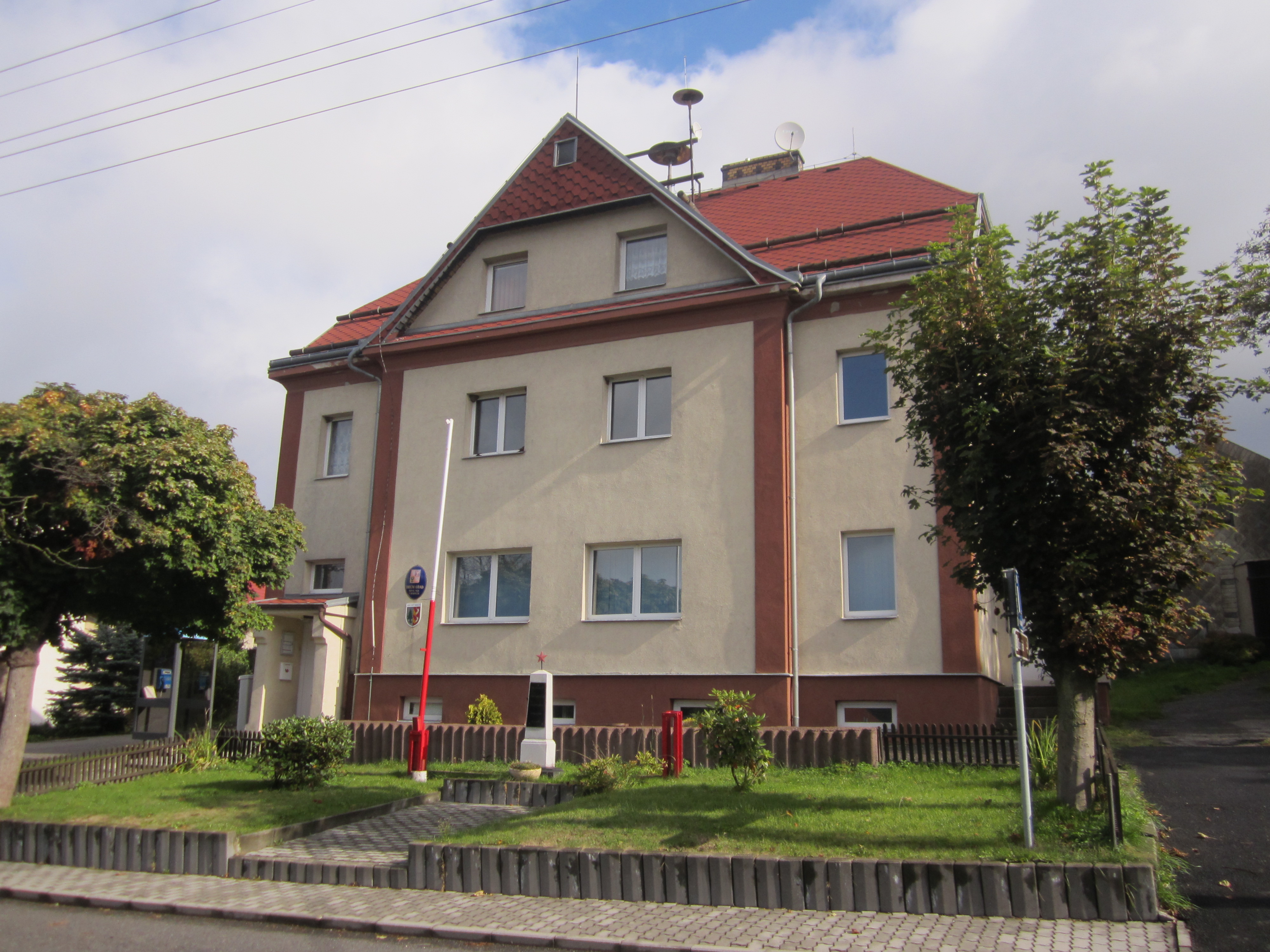 Obecní úřad v Nové Vsi v Horách